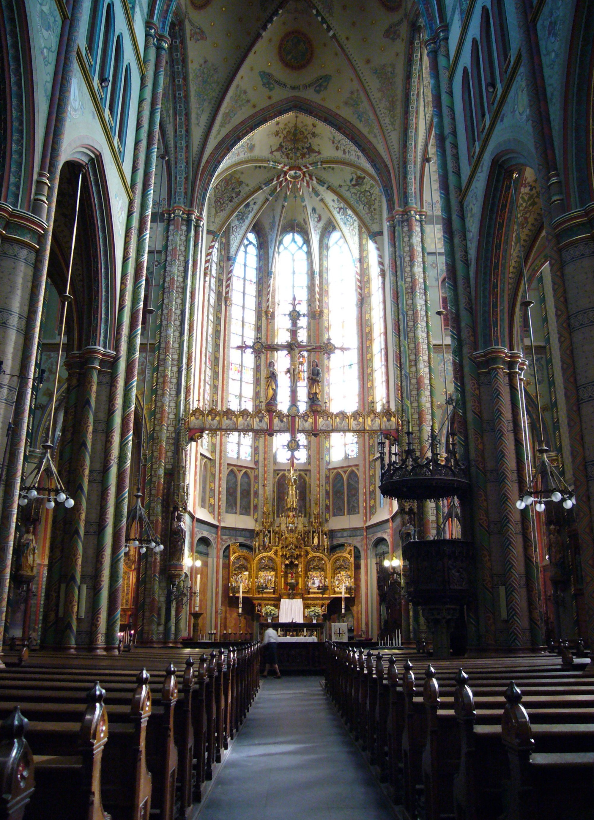 Interieur Willibrordkerk Utrecht